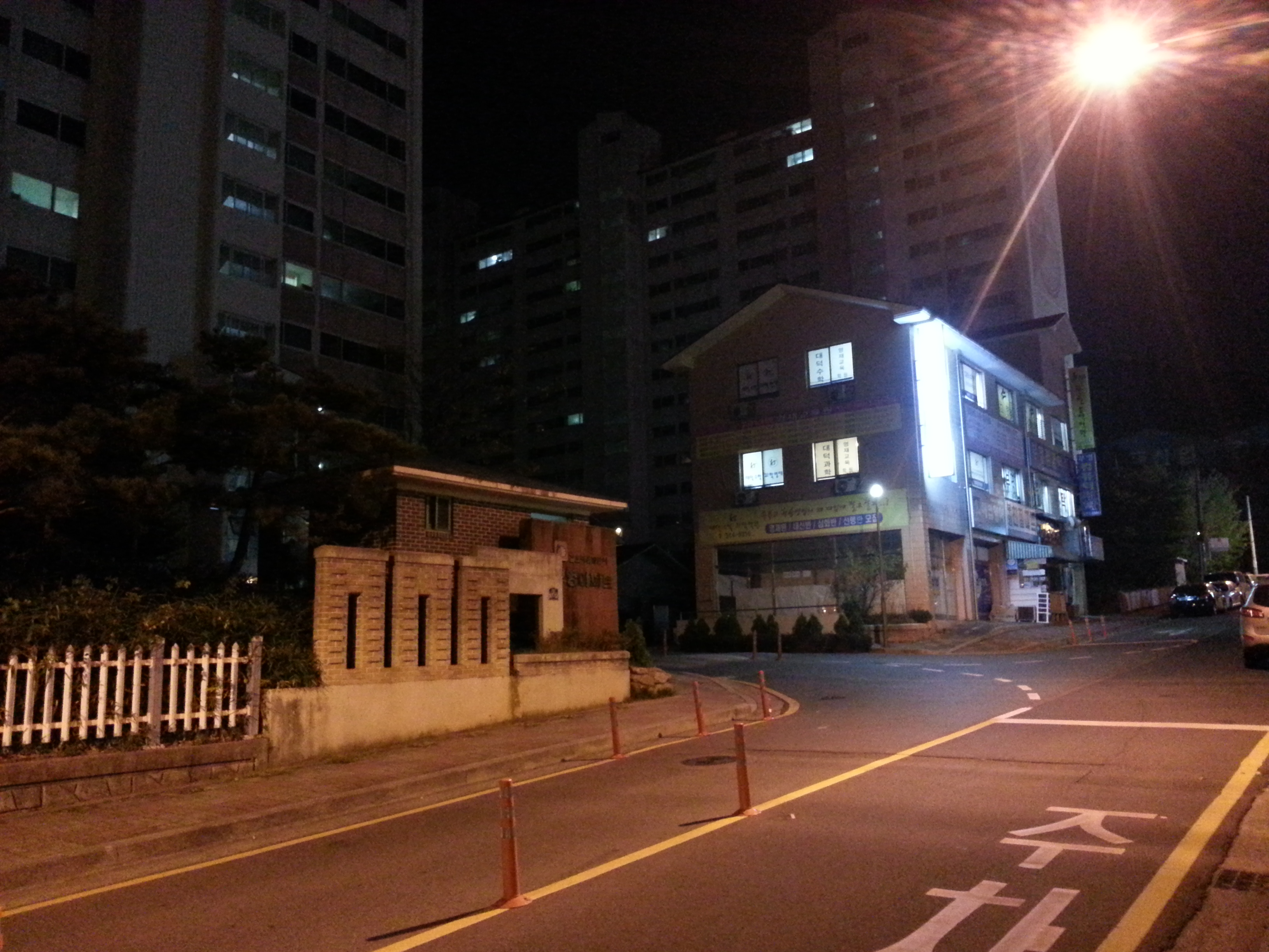 흔한 아파트 앞 상가이다.